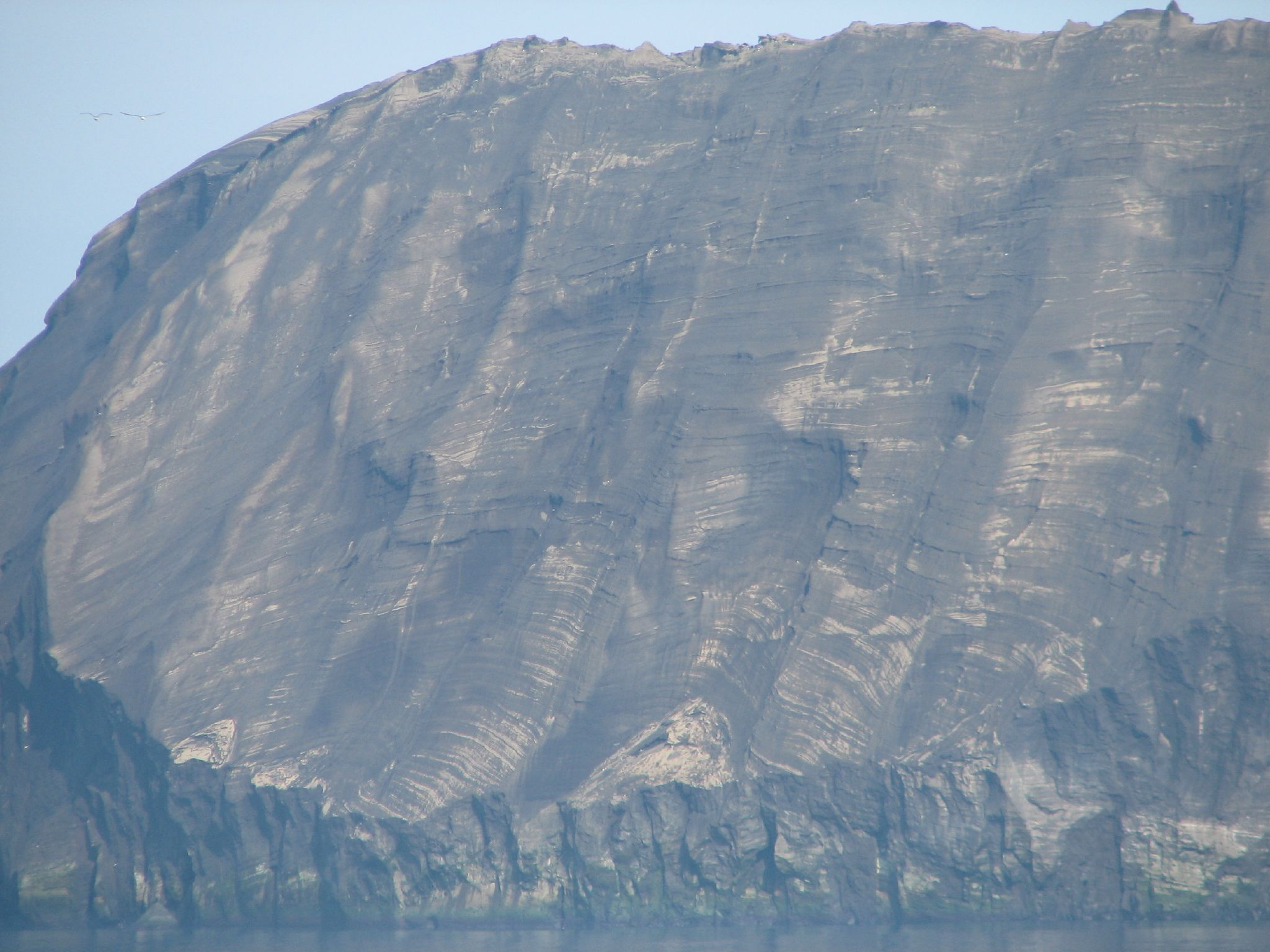 île de Surtsey